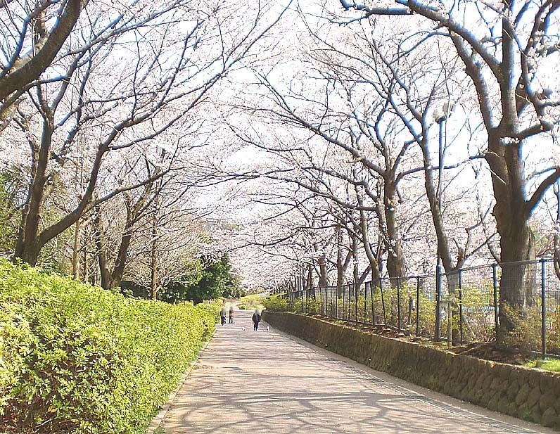 松戸運動公園